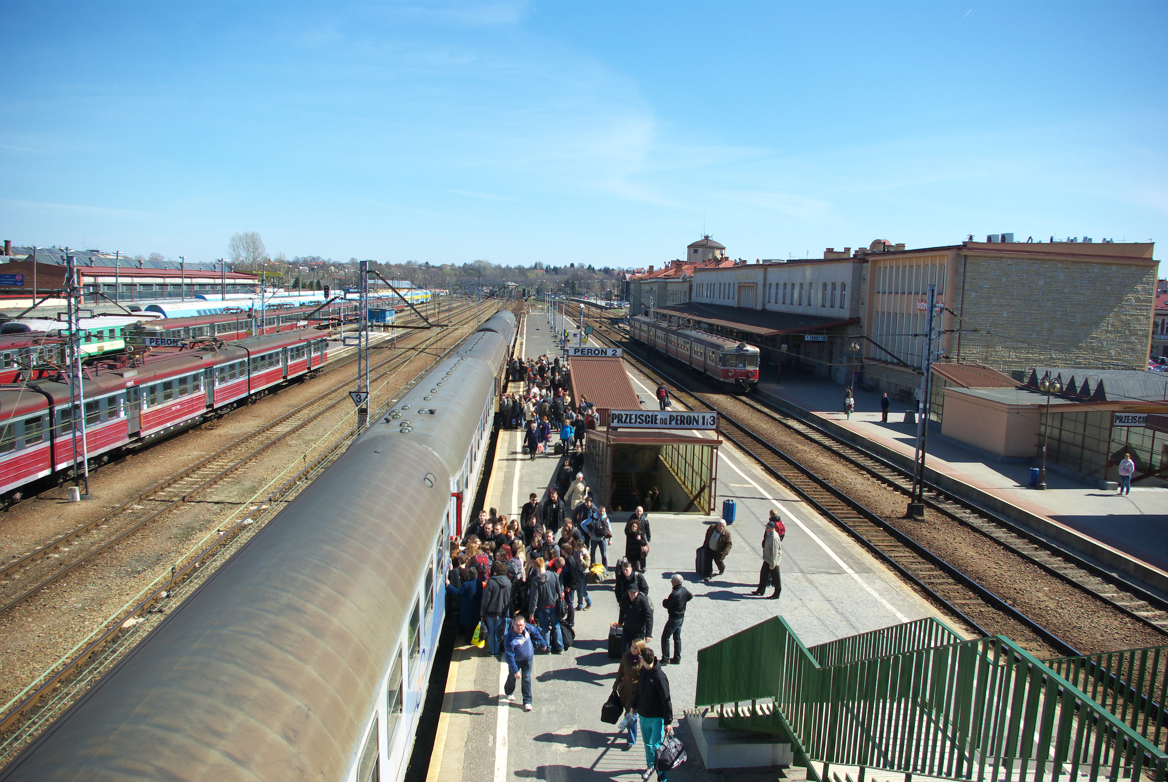 Dworzec kolejowy Rzeszów Główny